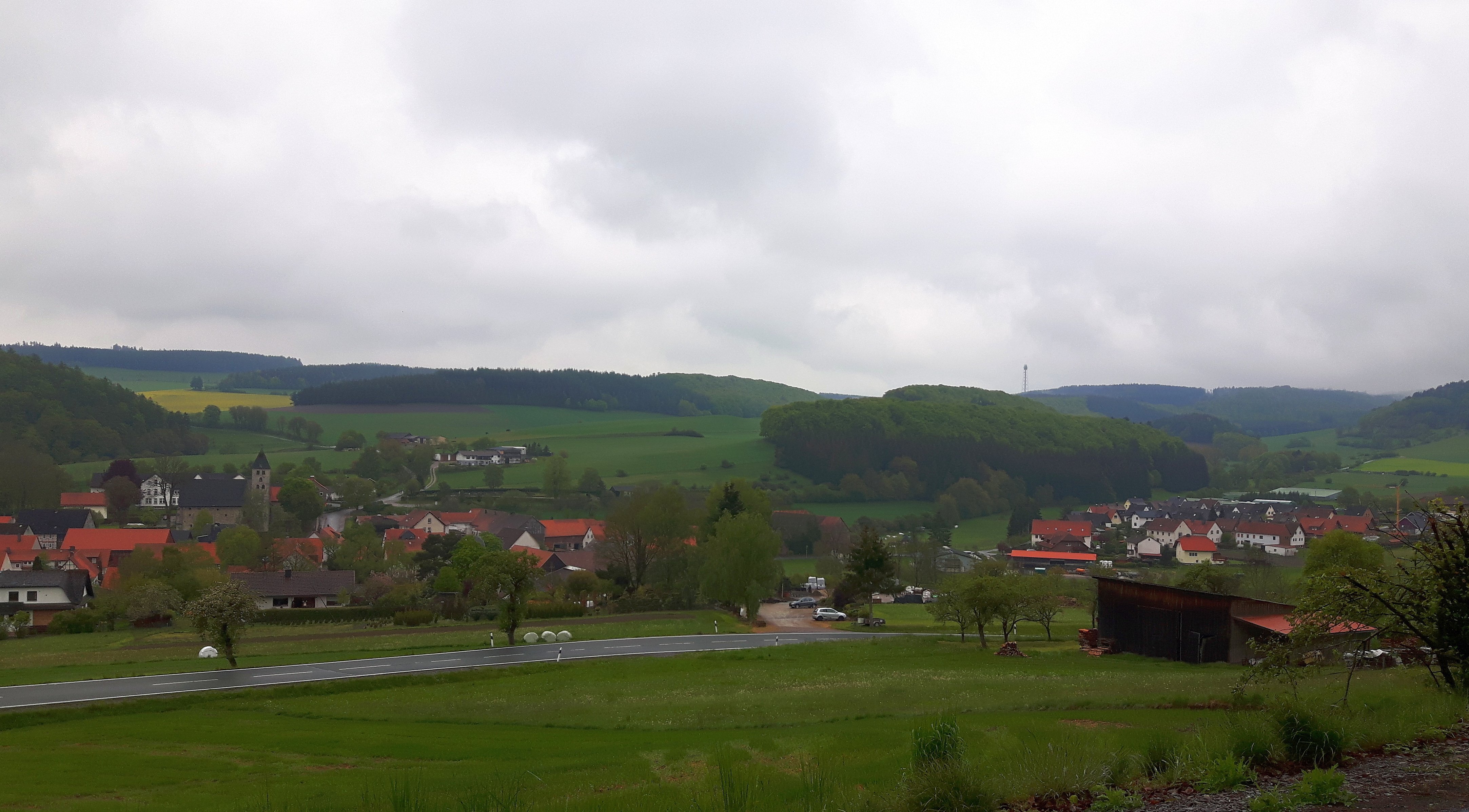 Blick auf Flechtdorf, Gemeinde Diemelsee